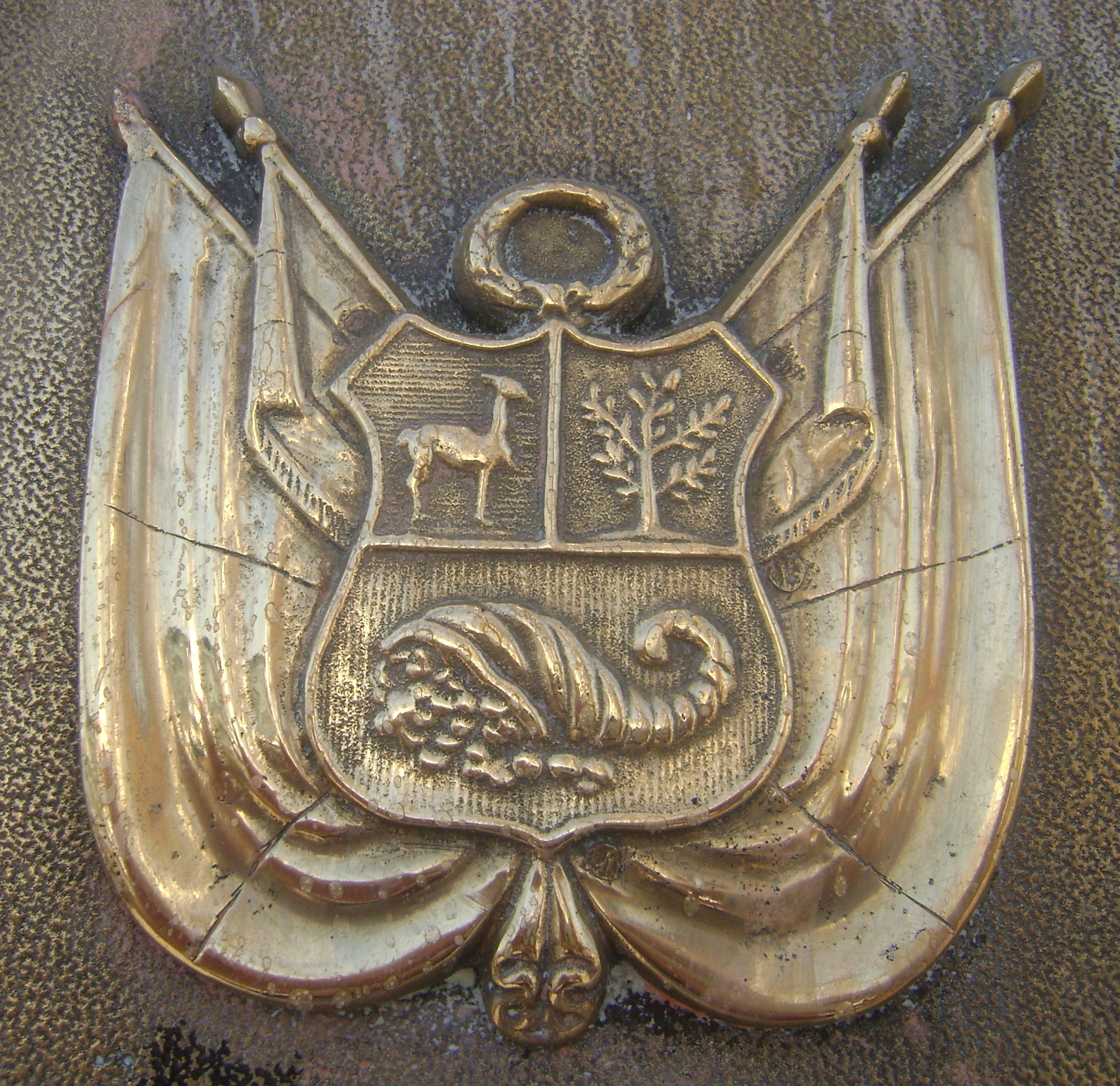 Escudo del Perú